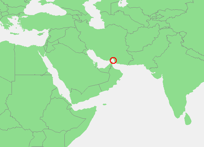 Localización del Estrecho de Ormuz. Kiswahili: Mahali pa Mlango wa Hormuz.